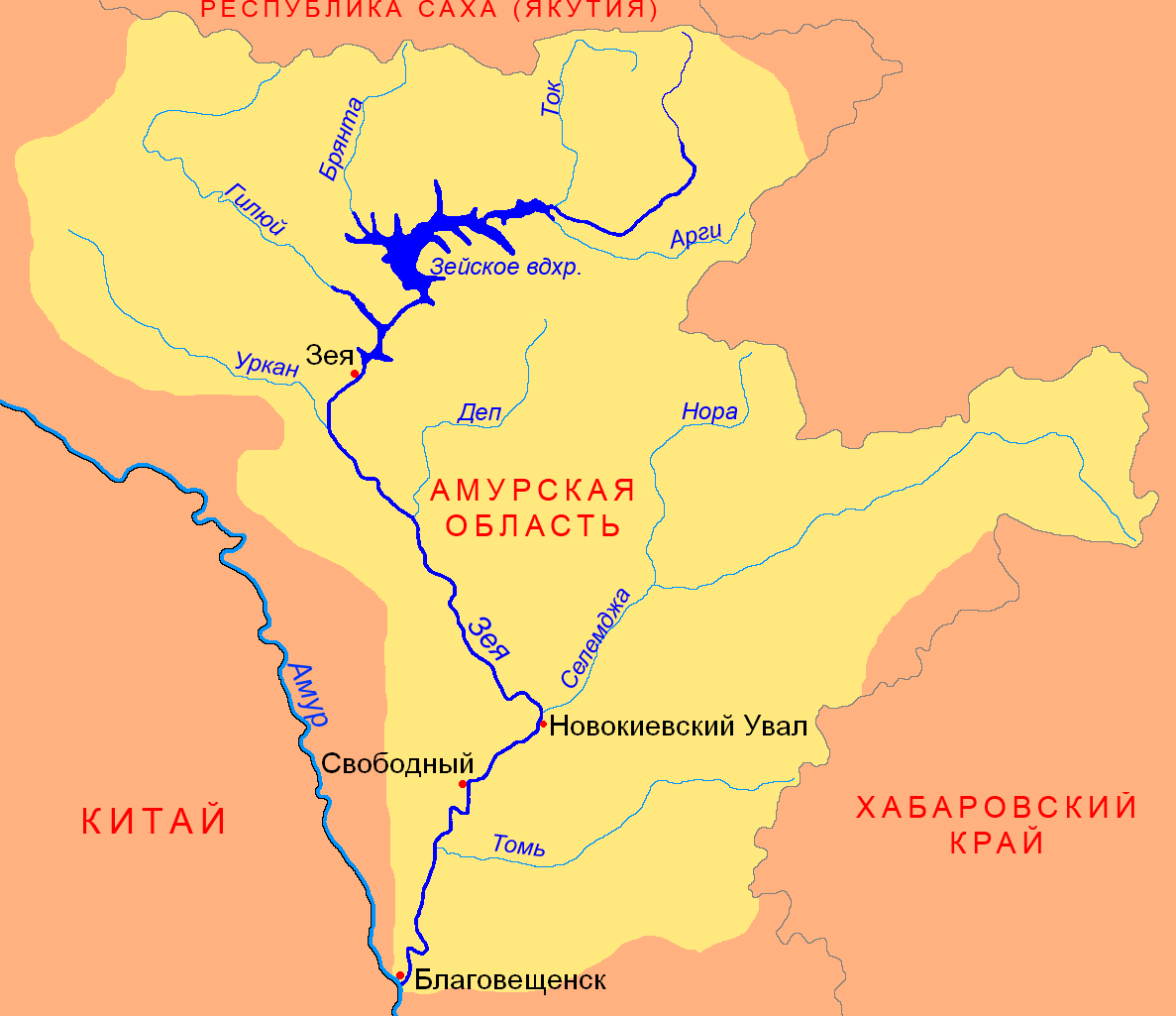 Схема бассейна реки Зея